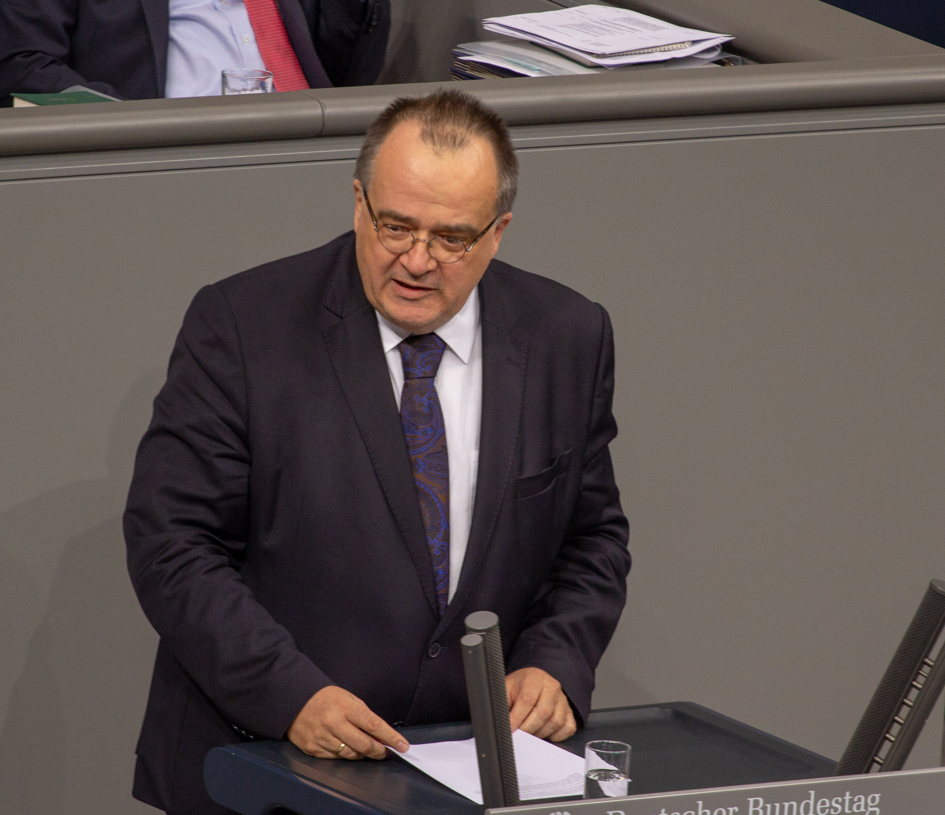 Matthias Zimmer, Mitglied des Deutschen Bundestages, während einer Plenarsitzung am 11. April 2019 in Berlin.